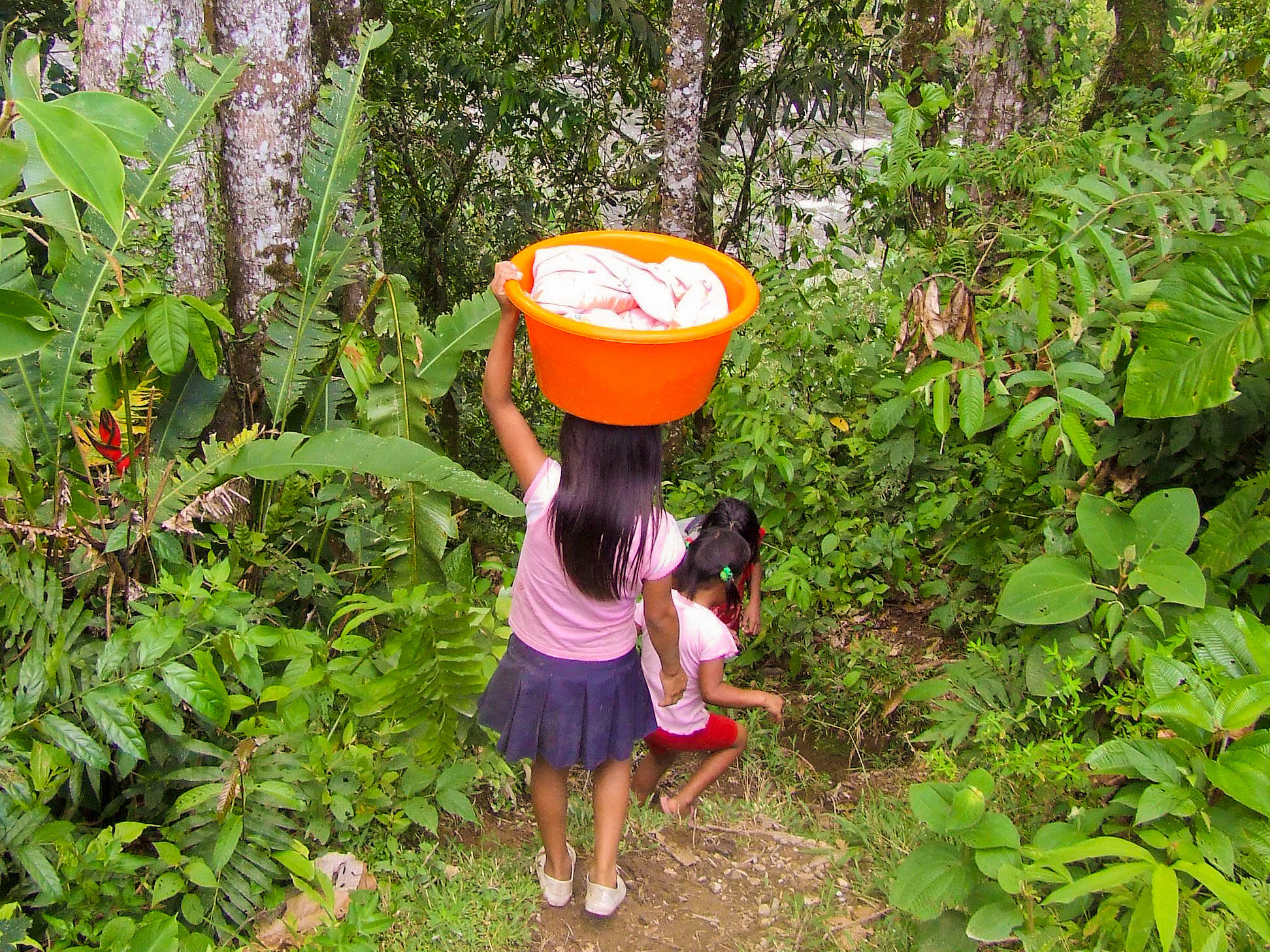 Shuar-Kinder auf dem Weg zum Wäsche waschen am Fluss. Ecuador, Hochland 2011